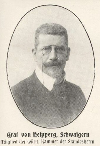 Reinhard von Neipperg (1856-1919) württembergischer Graf und Standesherr, Abgeordneter des Deutschen Reichstags (Zentrum)